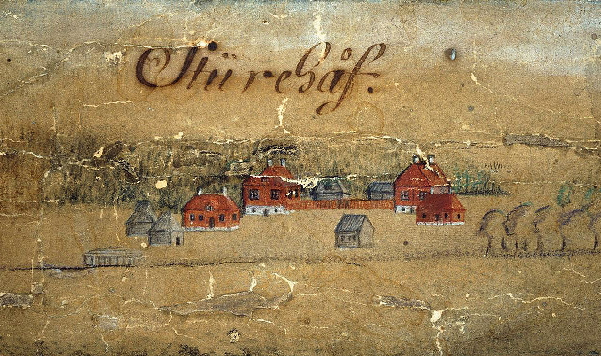 Sturehovs slott på Gripenhielms Mälarkarta